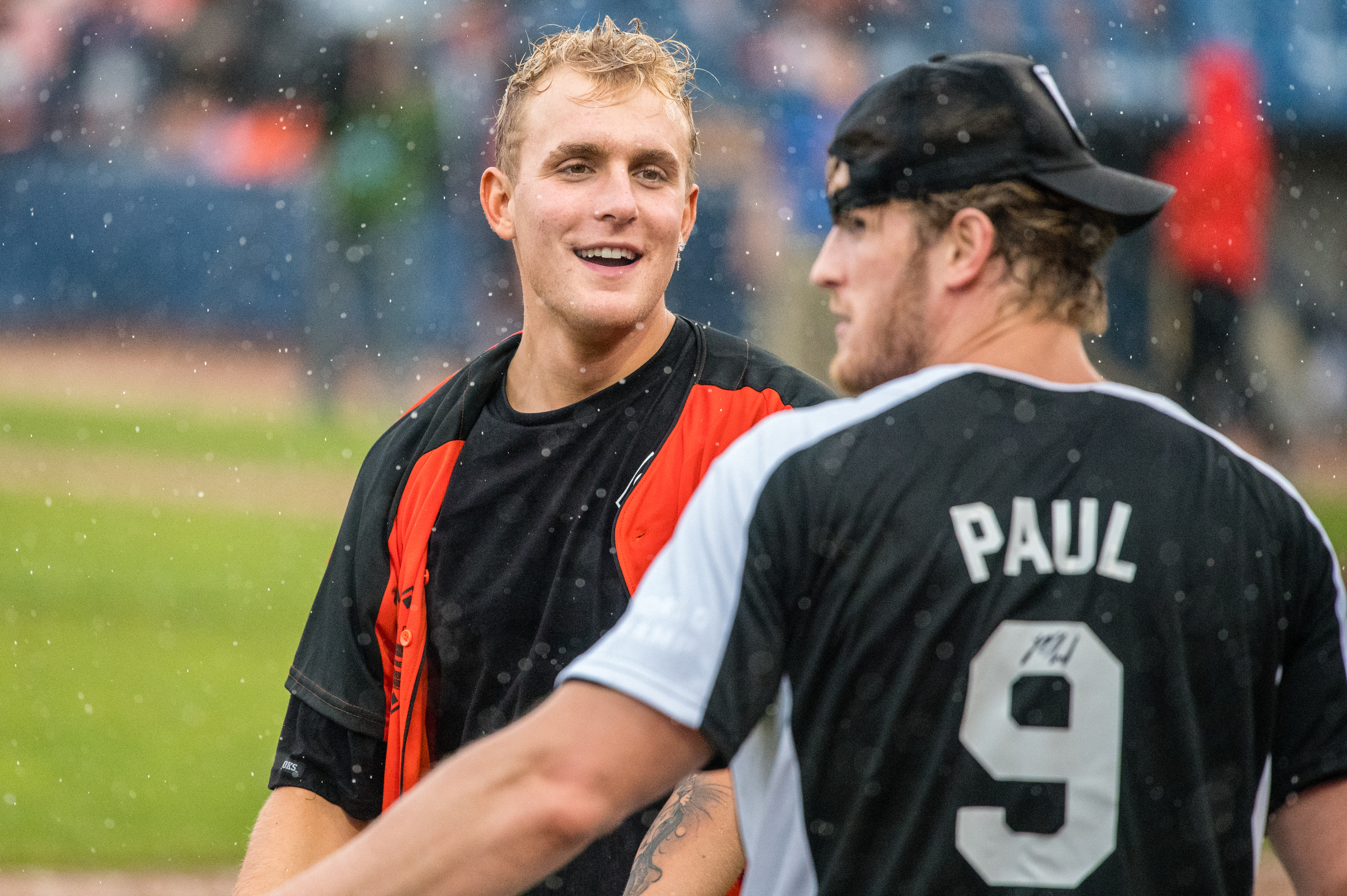 Jake Paul